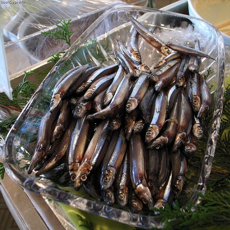 キビナゴ Spratelloides gracilis (Temminck and Schlegel, 1846) 動物界(Animalia) 脊索動物門(Chordata) 条鰭綱(Actinopterygii) ニシン目(Clupeiformes) ニシン科(Clupeidae) キビナゴ属(Spratelloides)